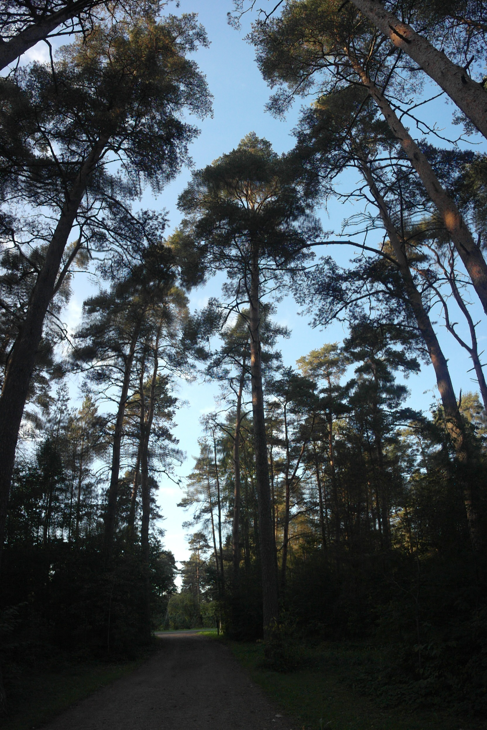 Männid Arukülas